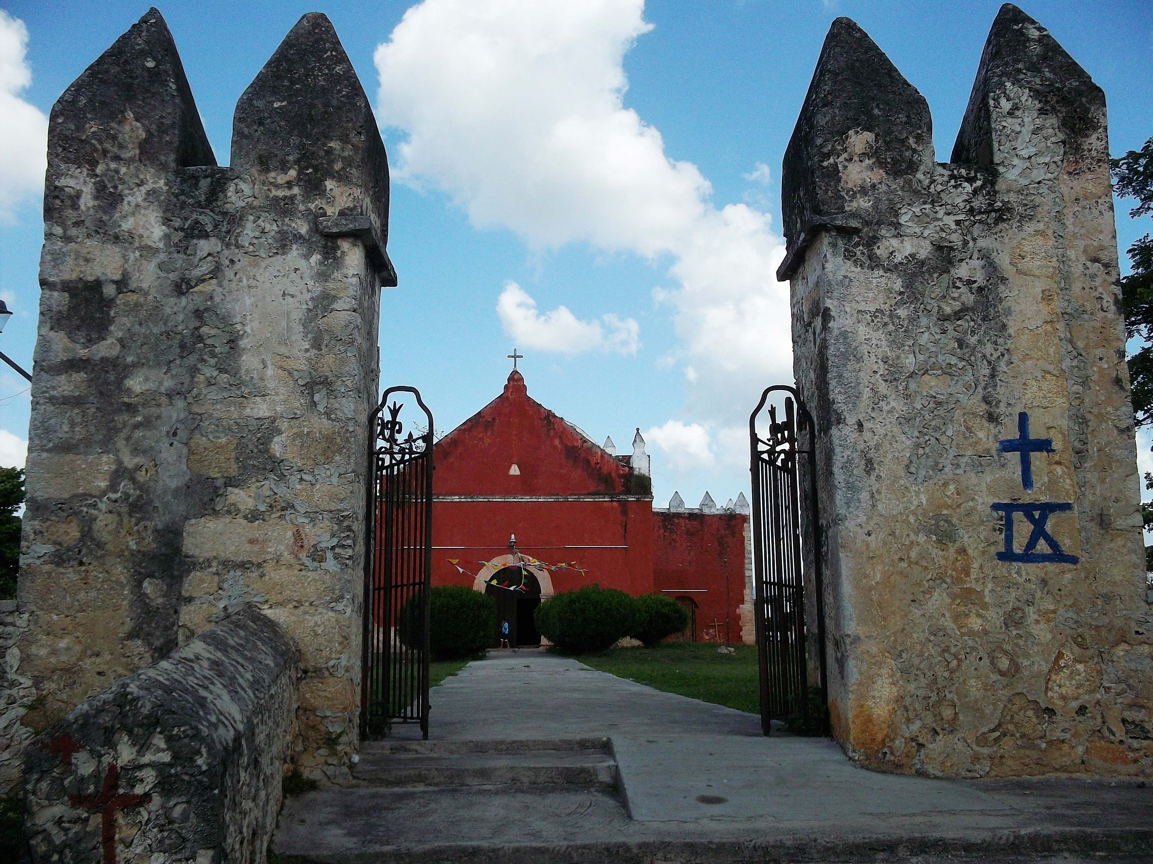 Iglesia de Euán, Yucatán.